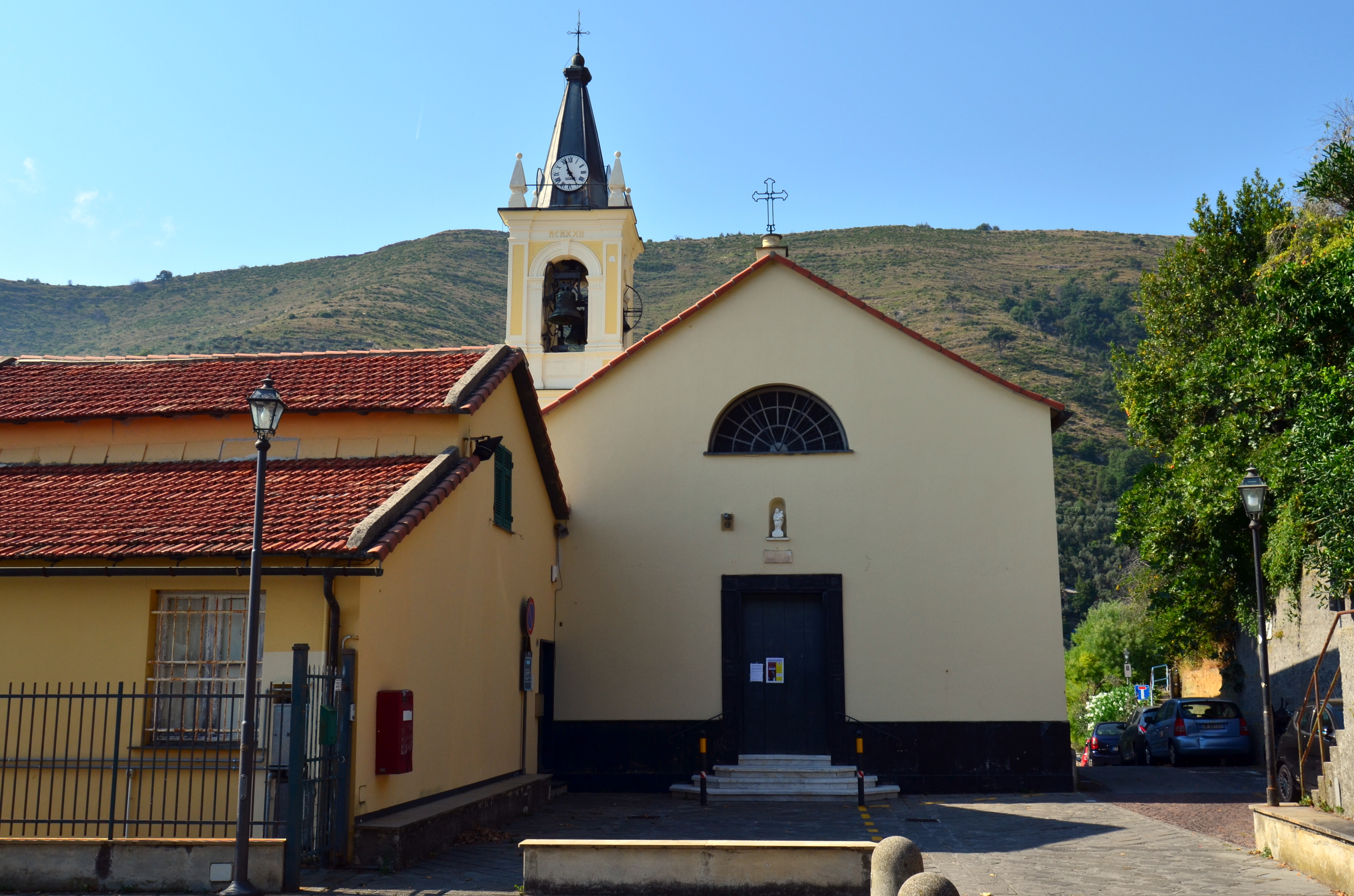 Chiesa dell'Ascensione di Gesù e Nostra Signora della Neve di Sessarego, Bogliasco, Liguria, Italia